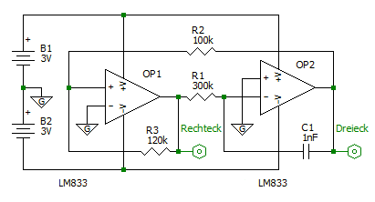 Dreieck Generator mit OPAMP